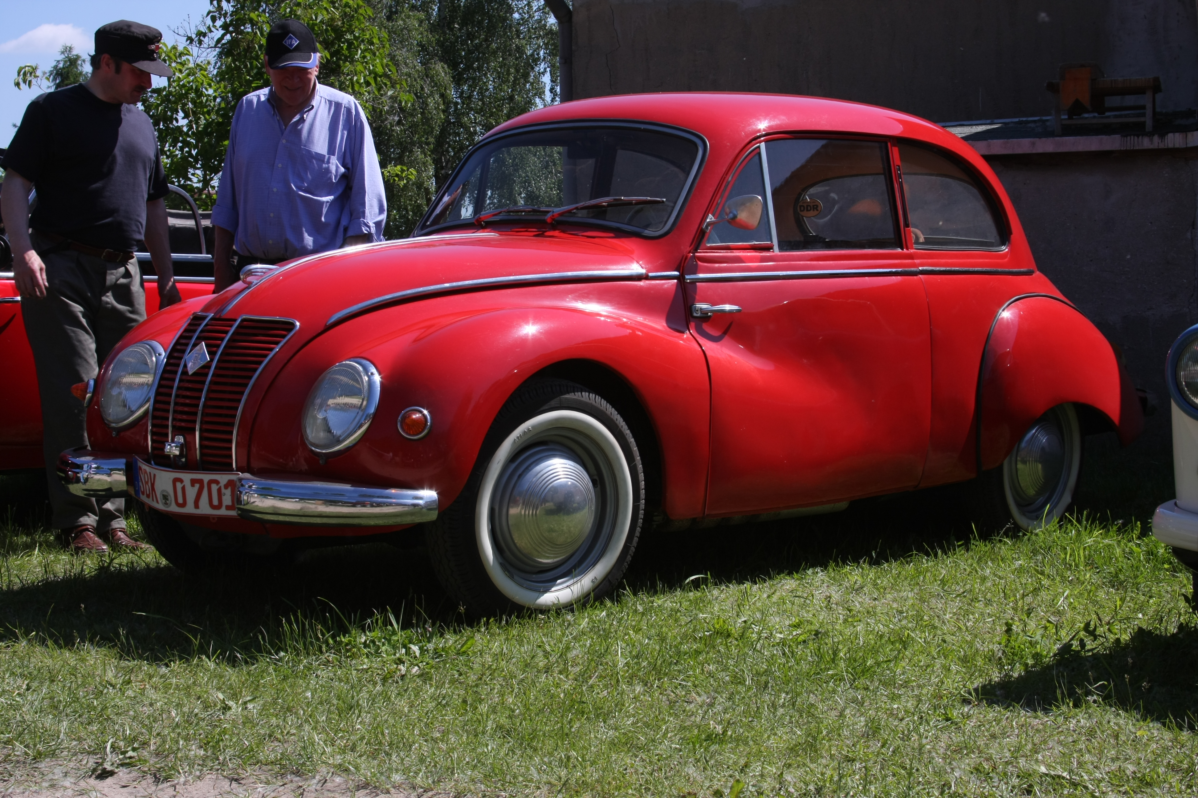 34. DKW-Treffen in Garitz 2010